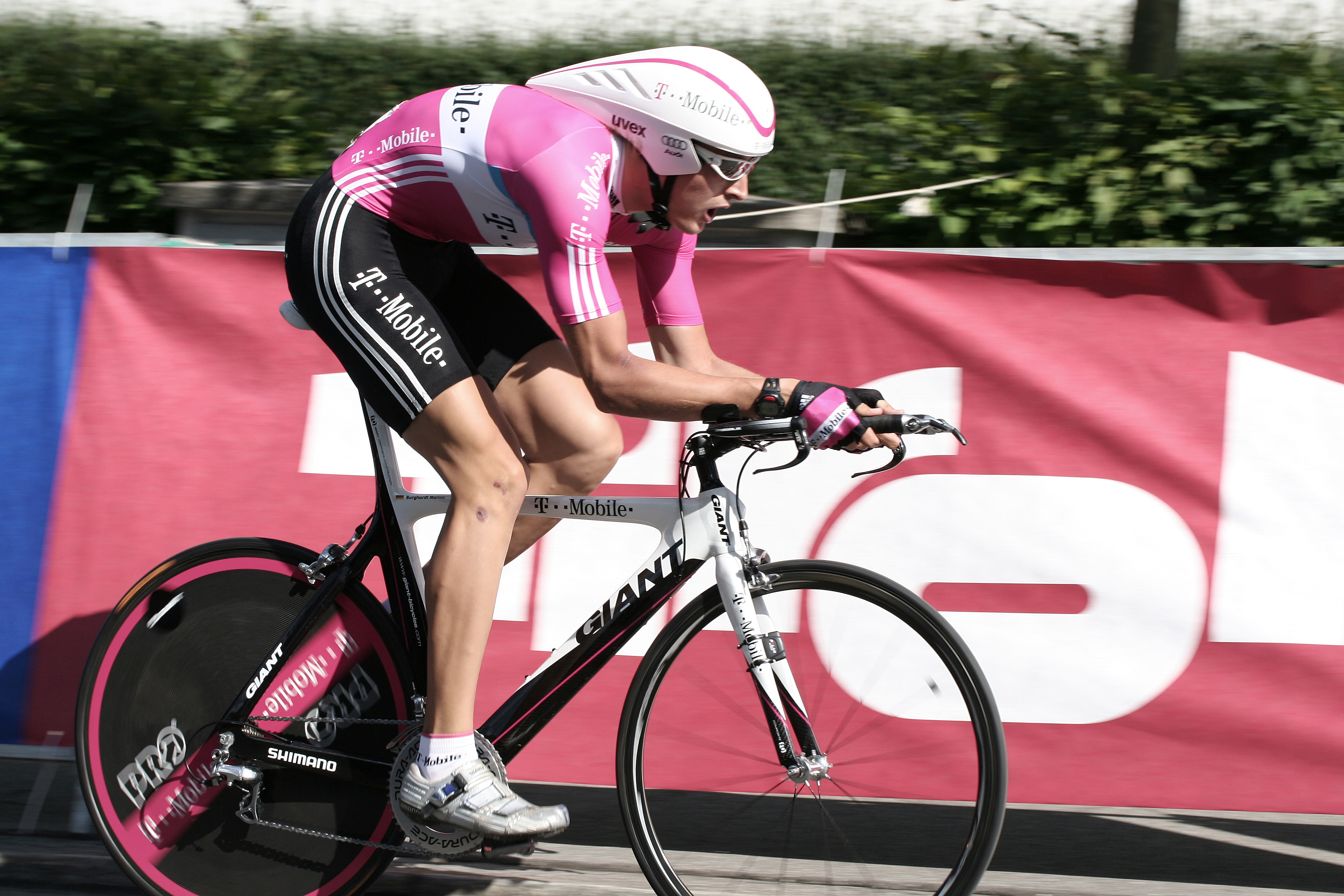 Marcus Burghardt, Olten, Switzerland (Prolog Tour de Suisse 2007)